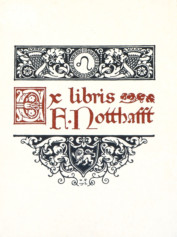 Книжный знак А. Нотгафт. 1912 г. Бумага, цветная цинкография. 11,7 х 8,8 см.